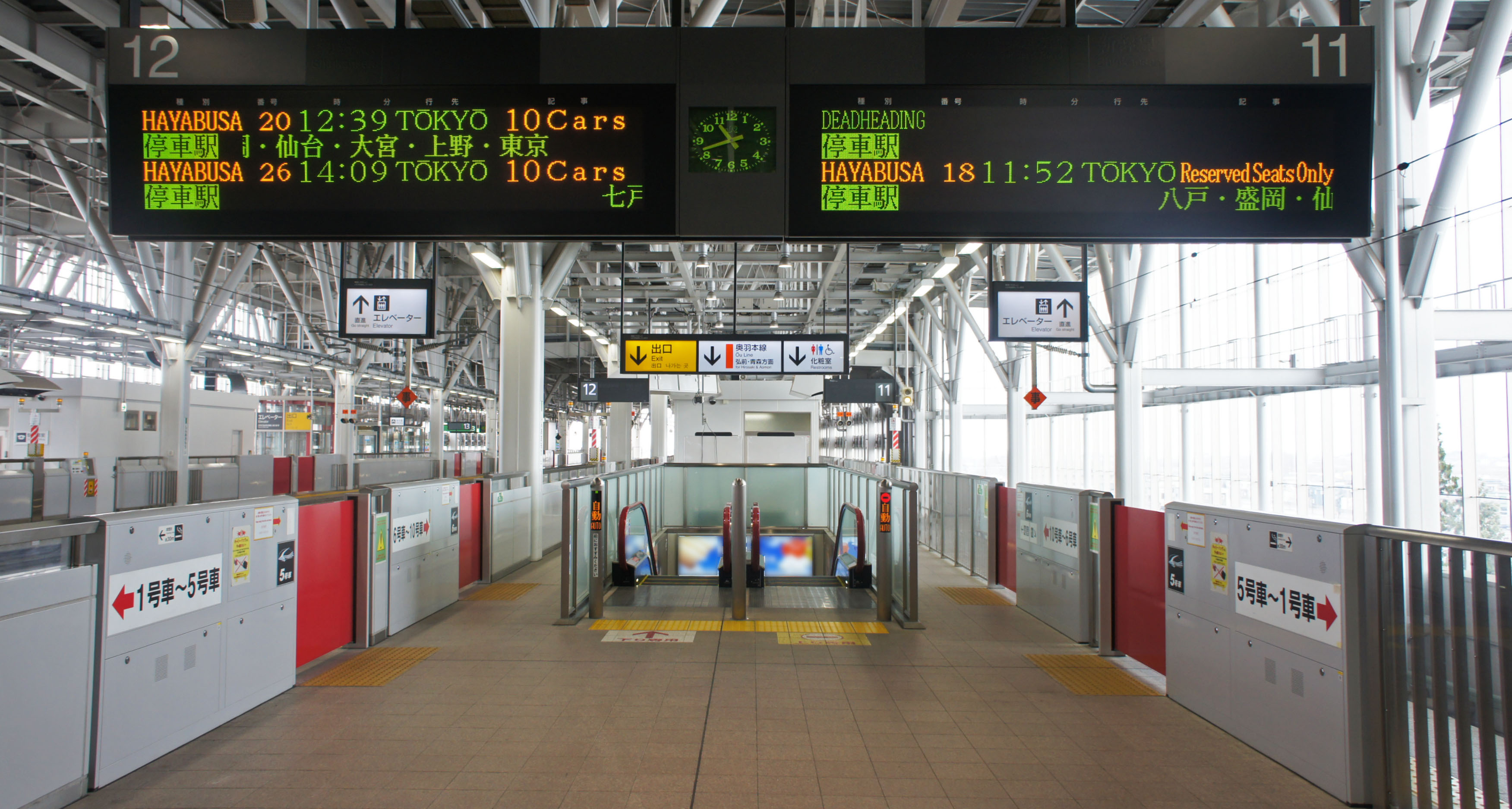 JR東北新幹線/北海道新幹線・新青森駅の11・12番線ホーム